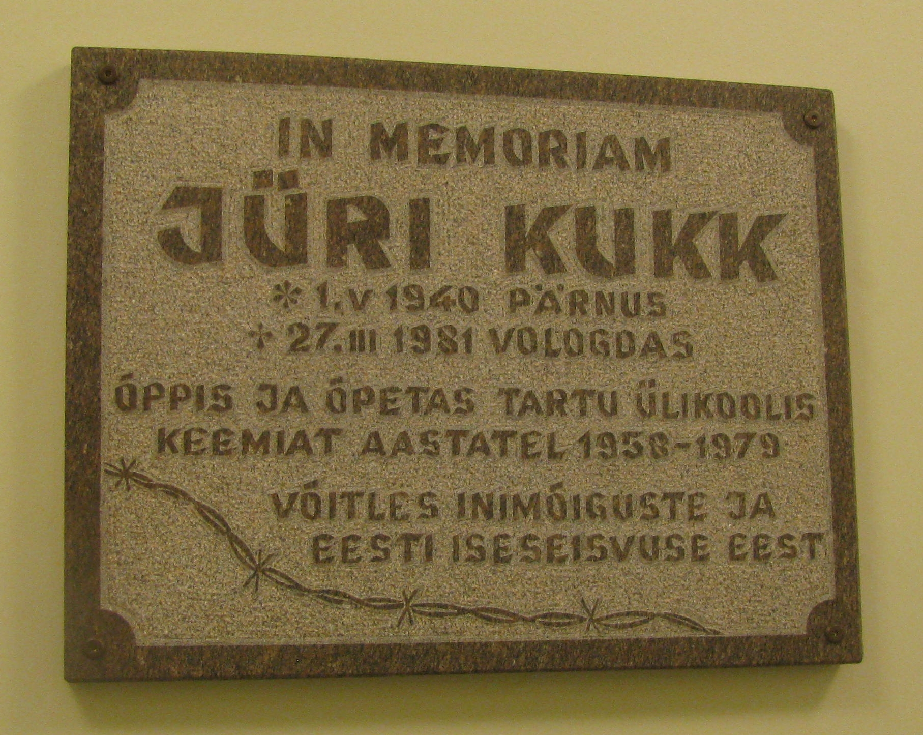 Jüri Kuke mälestustahvel Tartu Ülikooli õppehoones Jakobi 2, endises keemiahoones. Mälestusmärgi autor teadmata.